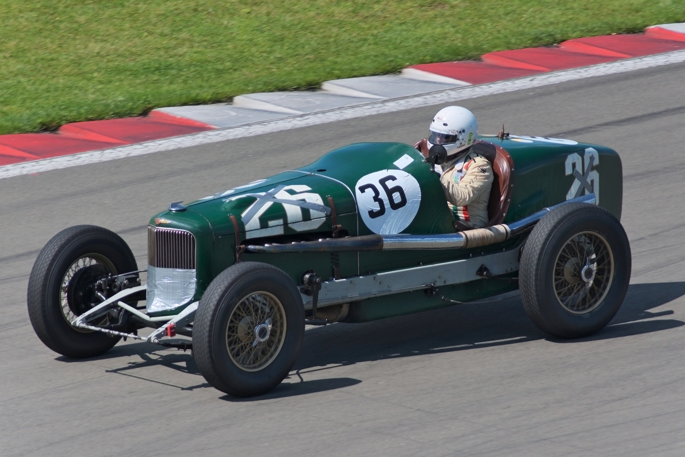 1932 Buick Shafer 8